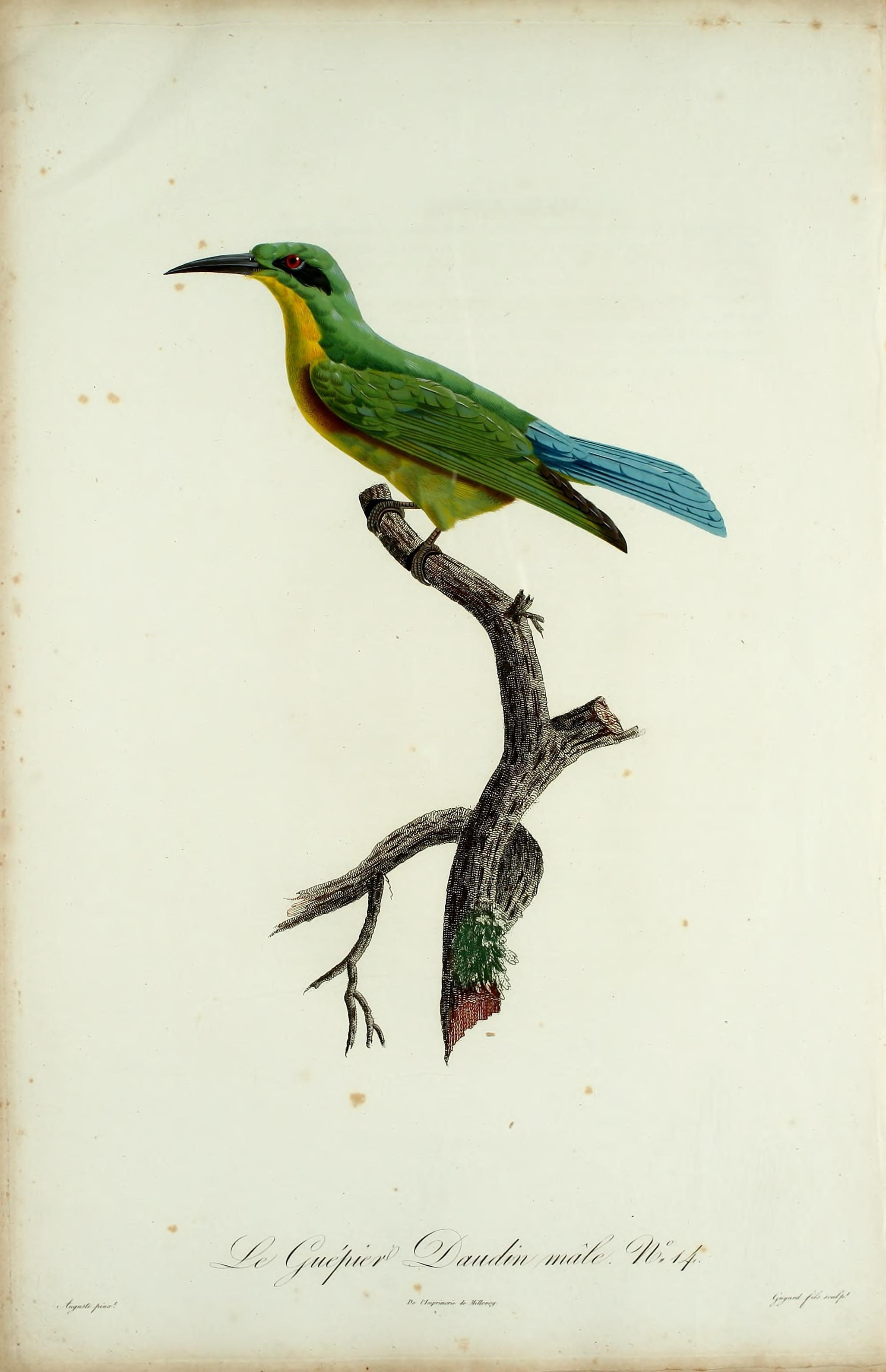 5o * HISTOIRE NATURELLE Sonnerai et M. Poivre, auxquels nous devons celte belle espèce qu'ils ont rapjiortée des Philippines, ne nous ont rien appris sur ses mœurs. Nous avons donné à cette espèce le nom de guêpier Daudin : ce nom rappellera aux naturalistes un jeune ornithologiste que la mort a enlevé aux sciences à la fleur de son âge, et au moment où il commençoit à faire jouir le public du fruit de ses travaux.